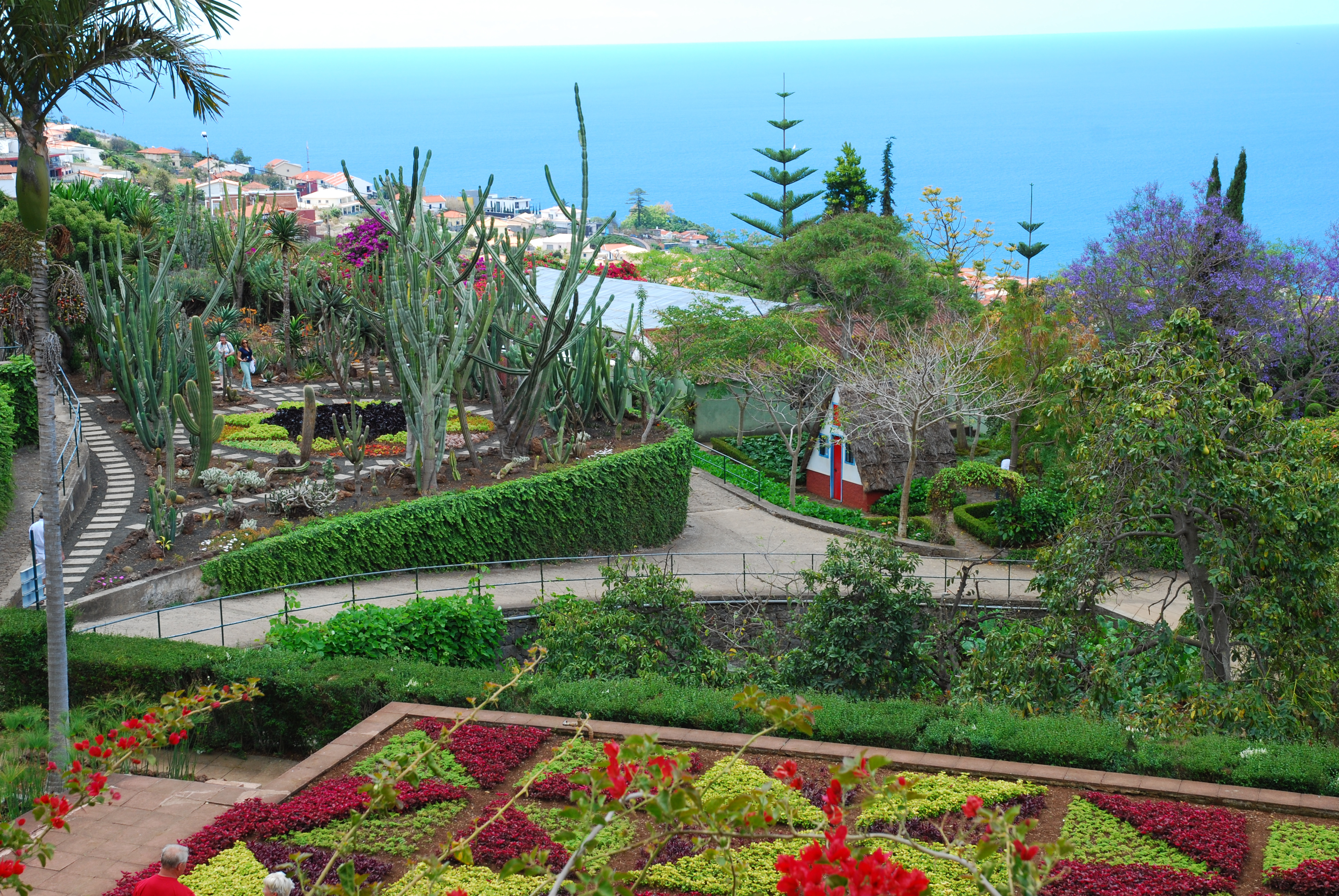 Madeira-01-0055